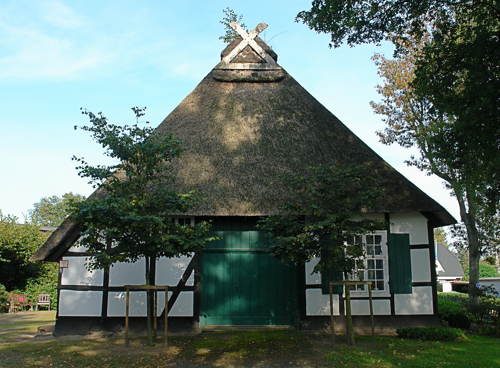 Haus Schumacher in Bremen, Oberneulander Landstraße 93.Das abgebildete Objekt ist ein geschütztes Kulturdenkmal in der Freien Hansestadt Bremen, mit der Nr. 0949 beim Landesamt für Denkmalpflege registriert.